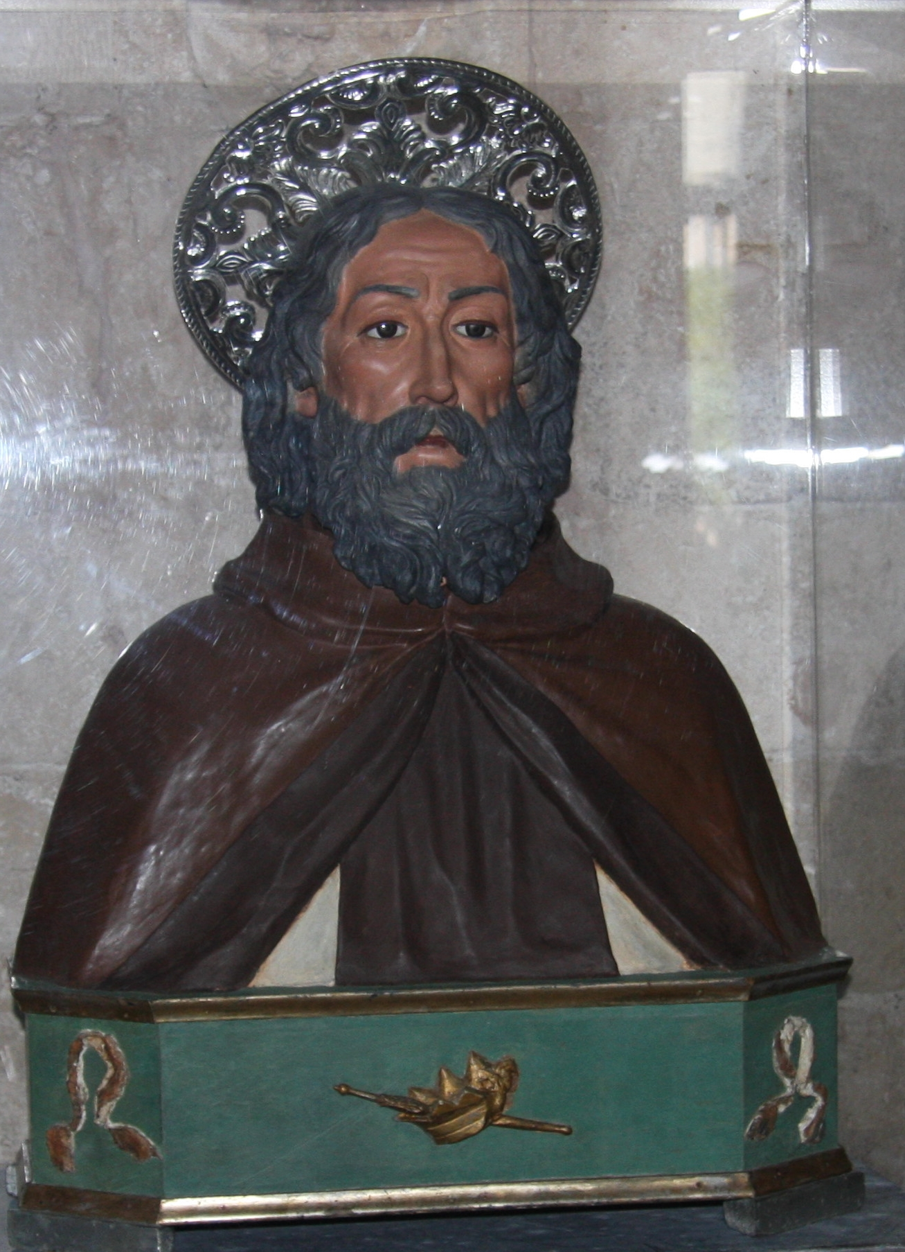 Statue représentant Saint-Conrad dans la Cathédrale de Saint-Conrad de Molfetta